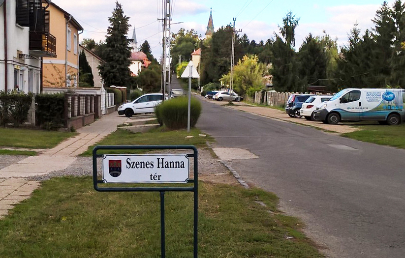 Szenes Hanna tér Dombóváron, háttérben a gimnázium épülete